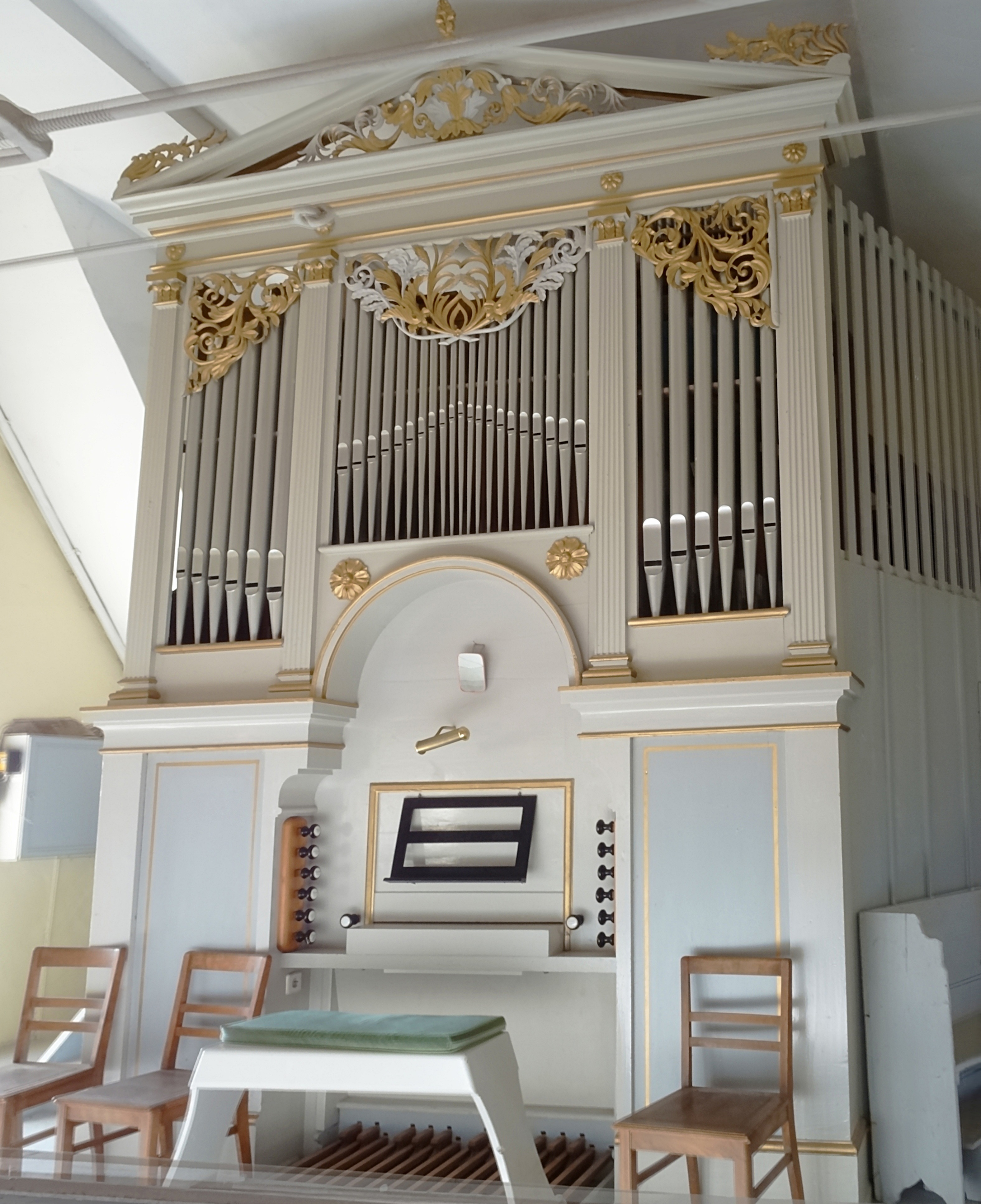 Orgel von Julius Strobel (1845) in St. Johannis (Wasserthaleben)